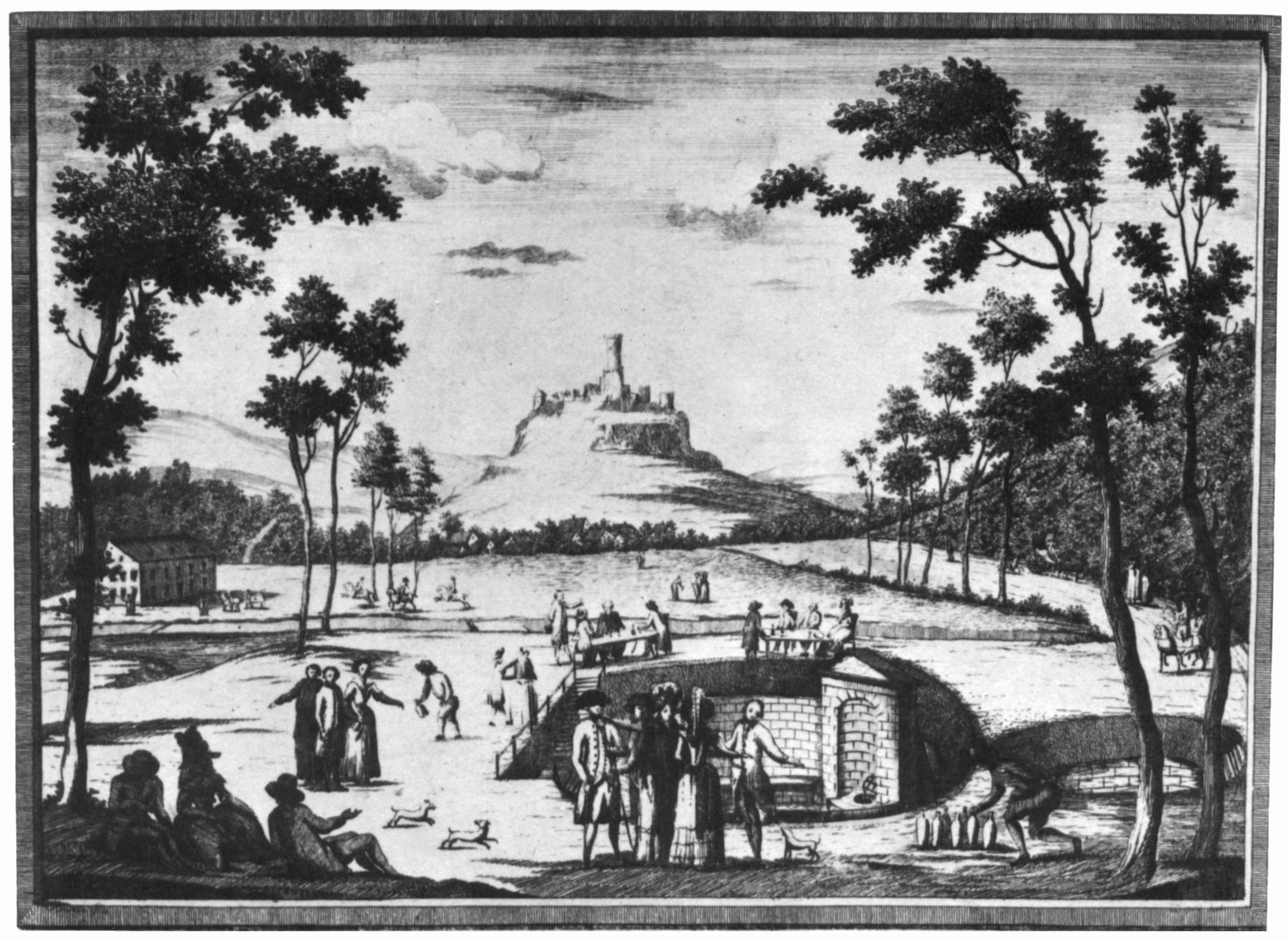 Draischbrunnen